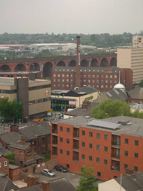 Stockport, UK.